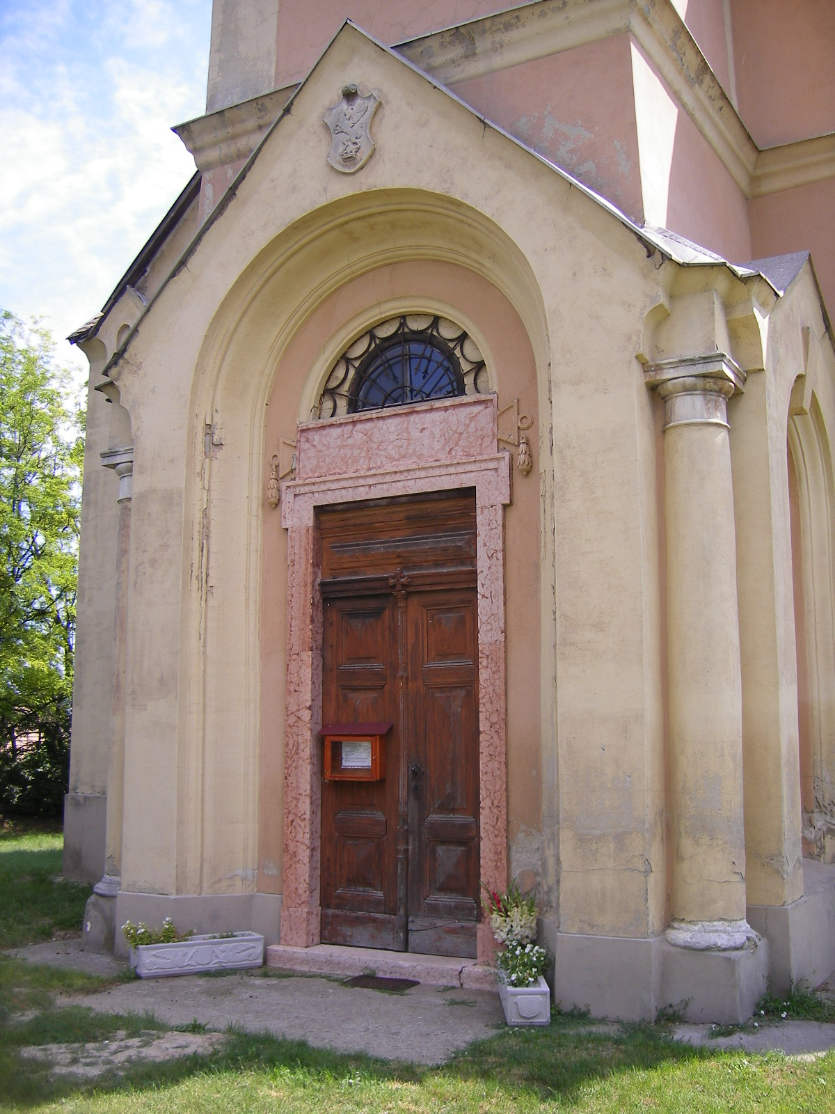 Kocs - katolikus templom /főbejárat/